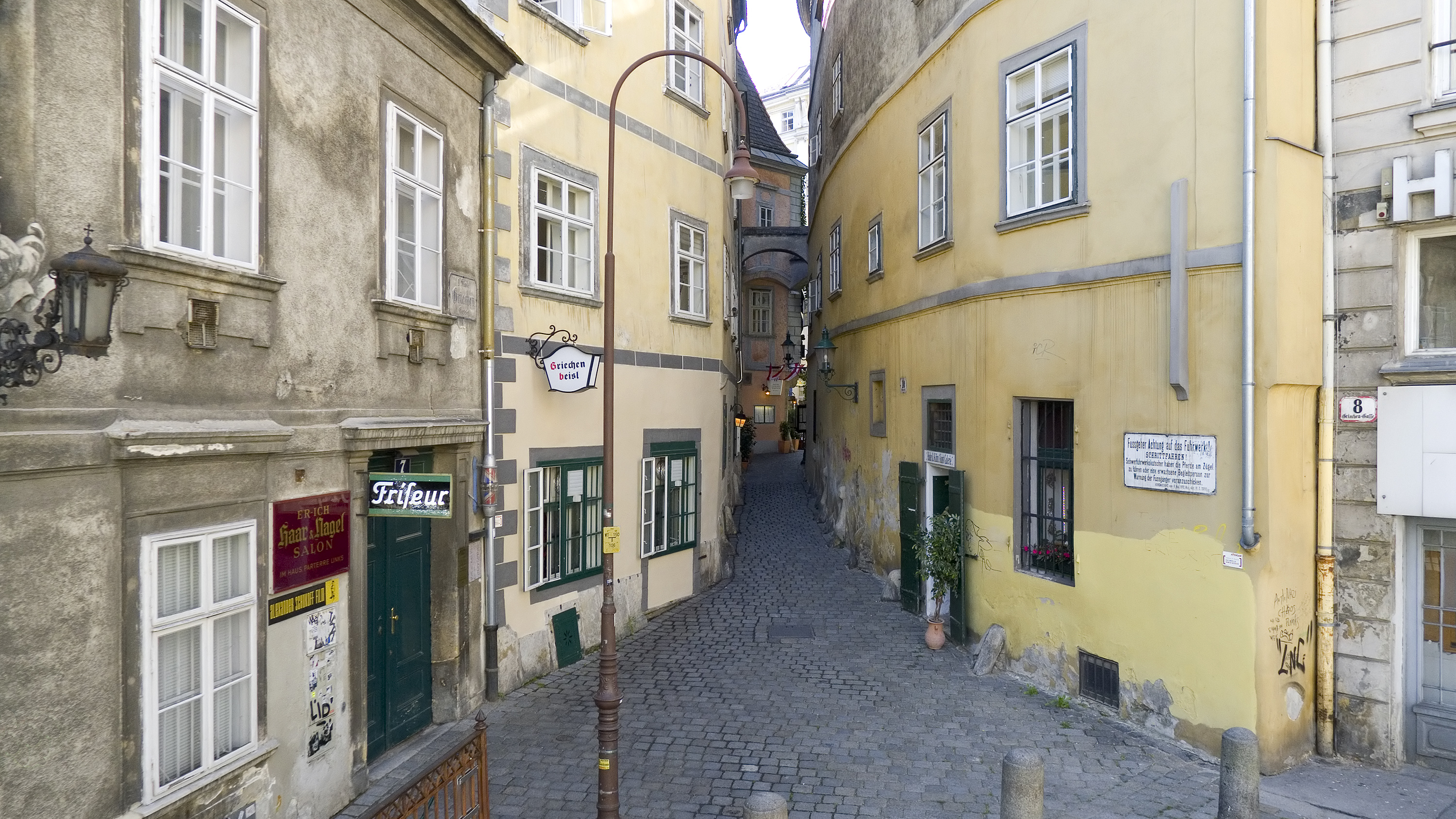 Griechengasse in Wien 1, bei Nr. 10 Richtung Süden